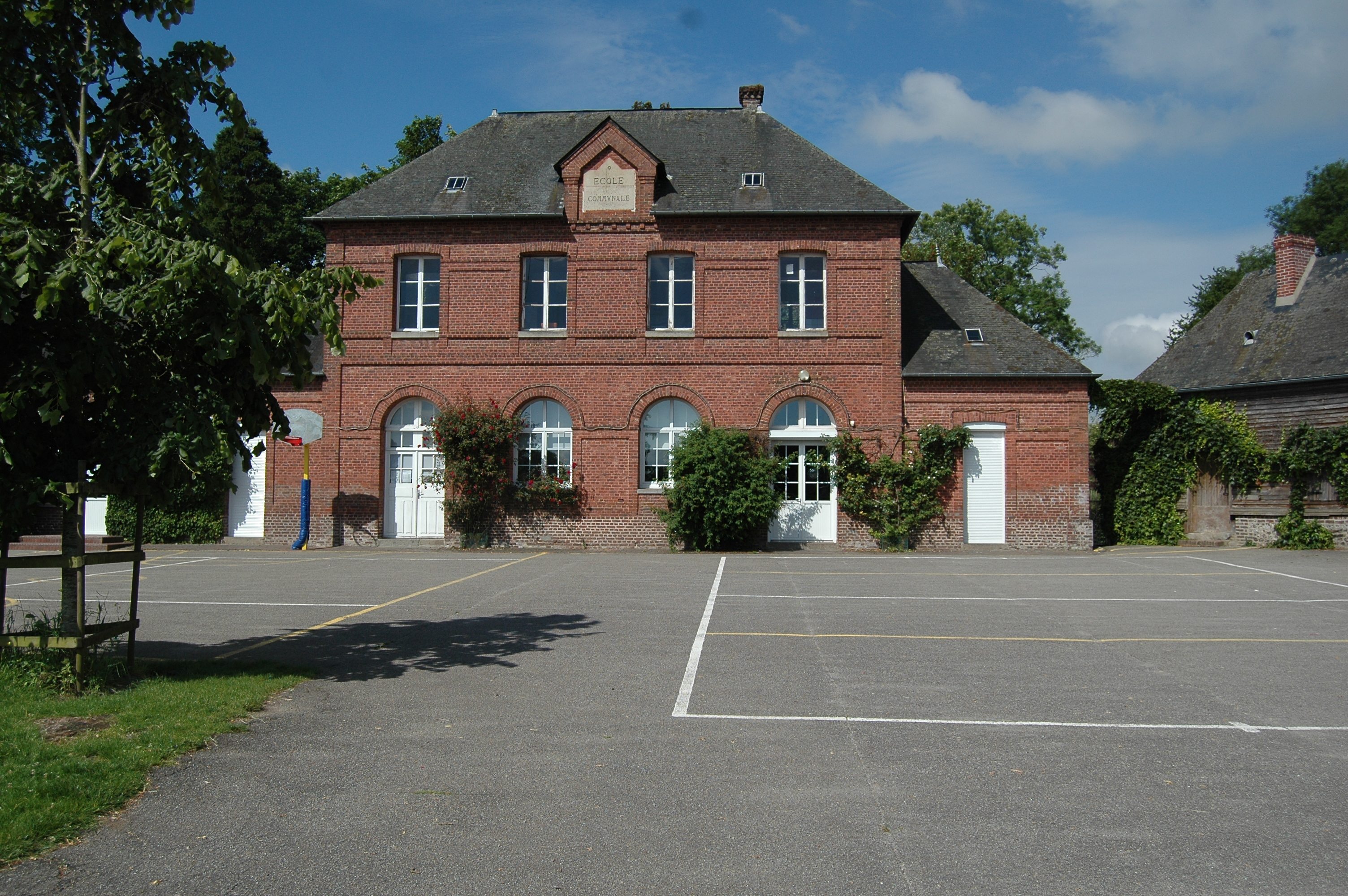 mairie de biville